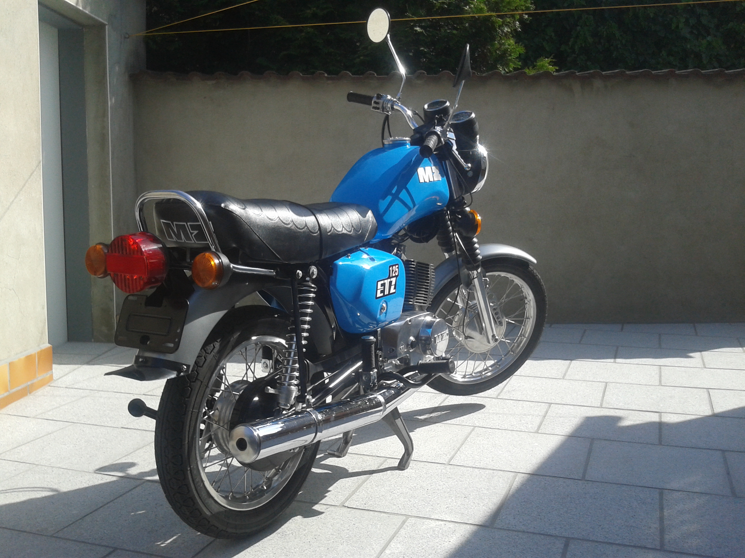 MZ ETZ 125 neu aufgebaut